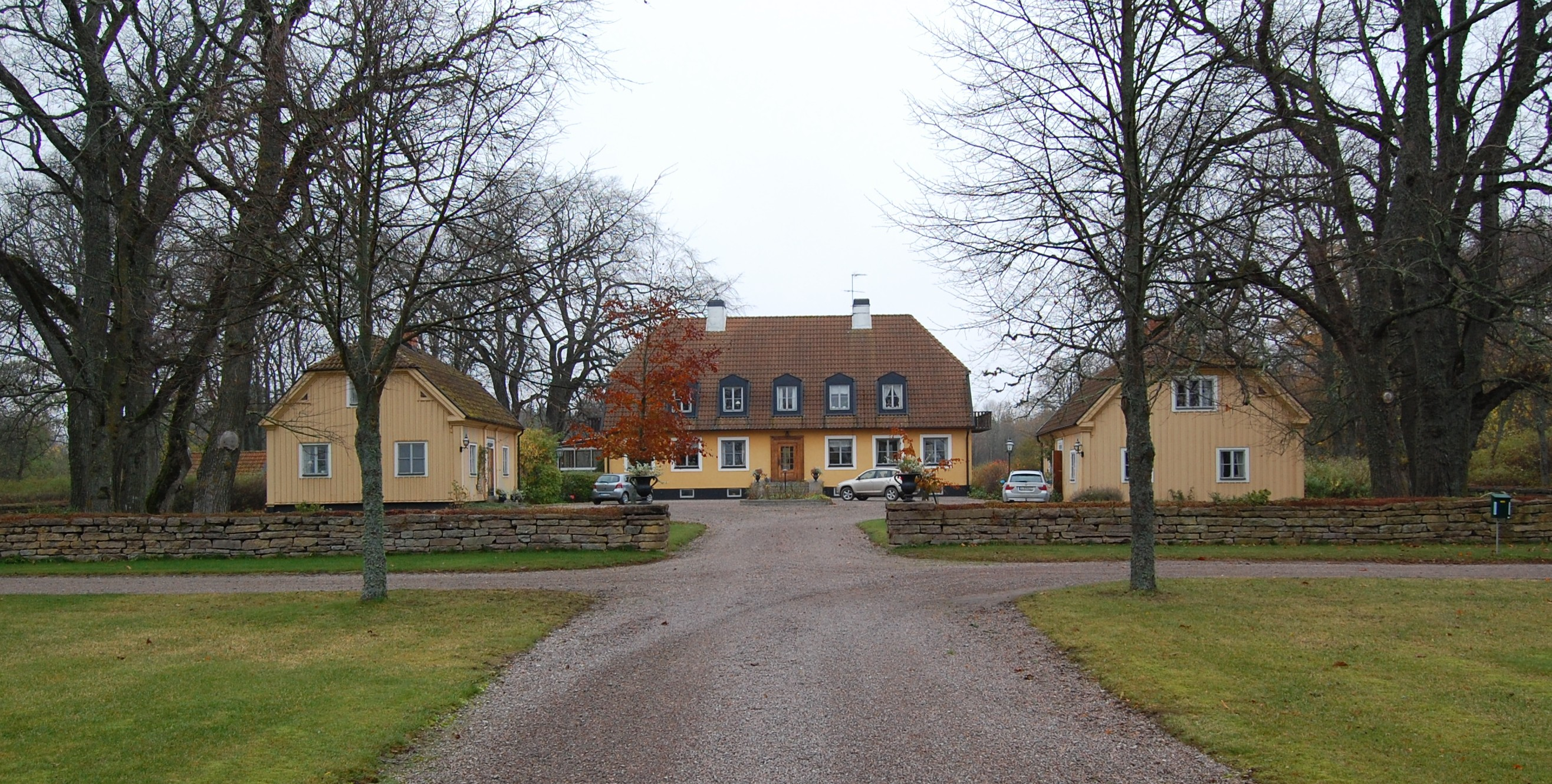 Huvudbyggnaden på Renstad Gård